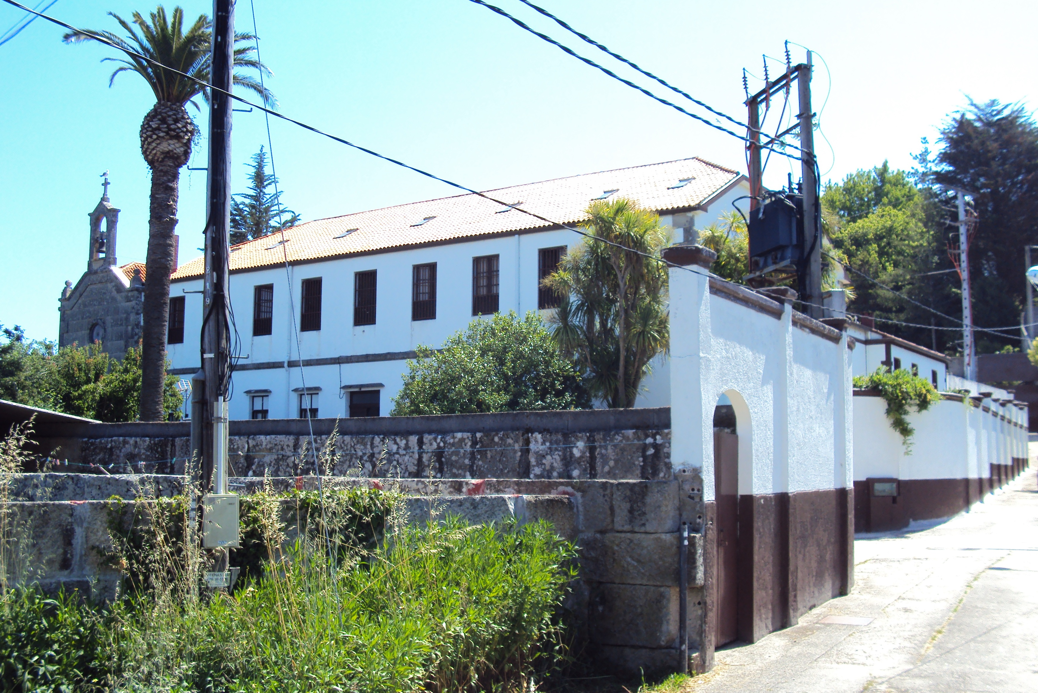 Mosteiro de Carmelitas Descalzas da Virxe do Carme e San Xosé de Sabarís, Baiona.